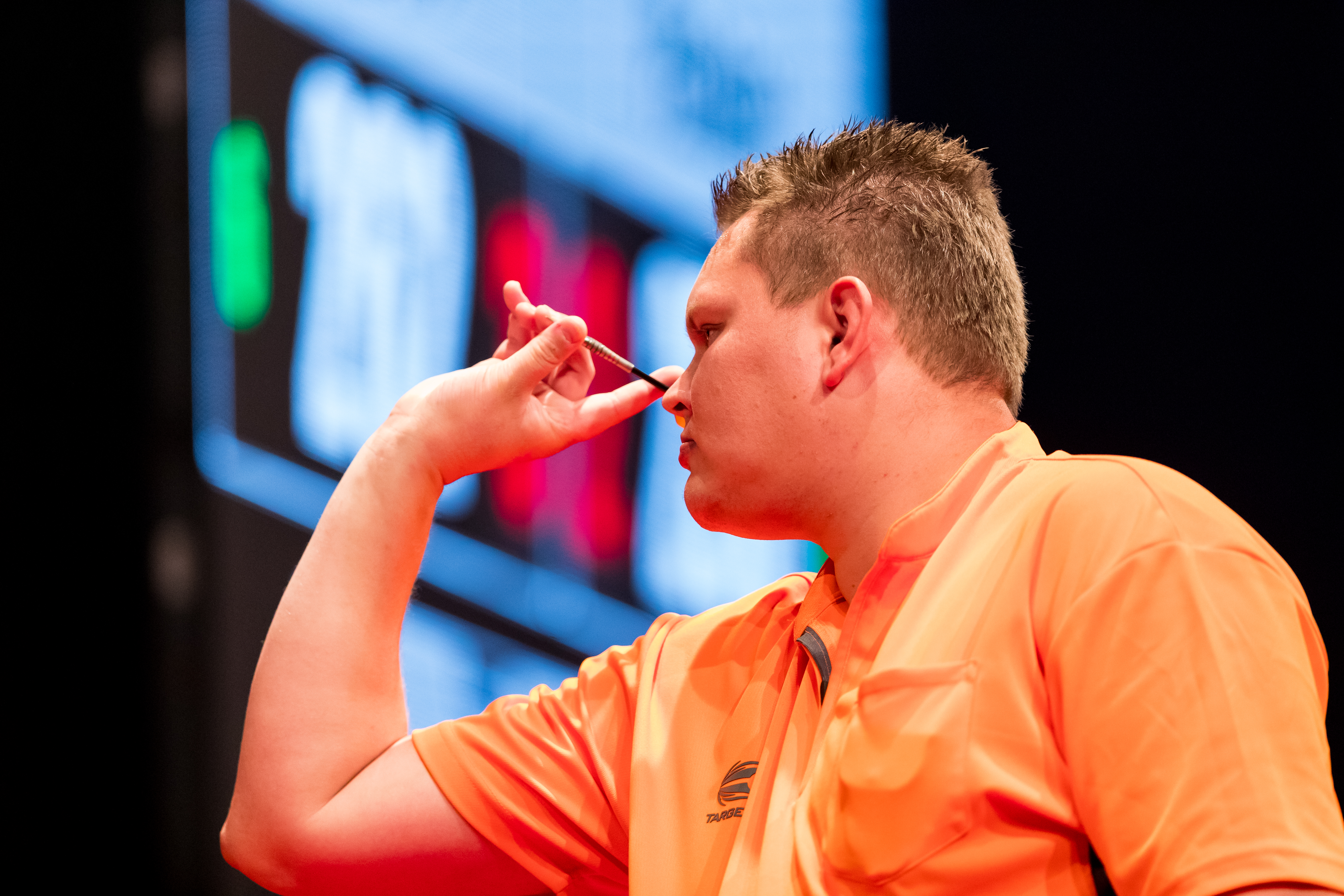 Jamie Hughes 6:5 Wesley Plaisier during PDC Europe Darts Matchplay at Maimarkthalle, Mannheim, Baden-Württemberg, Germany on 2019-09-06, Photo: Sven Mandel